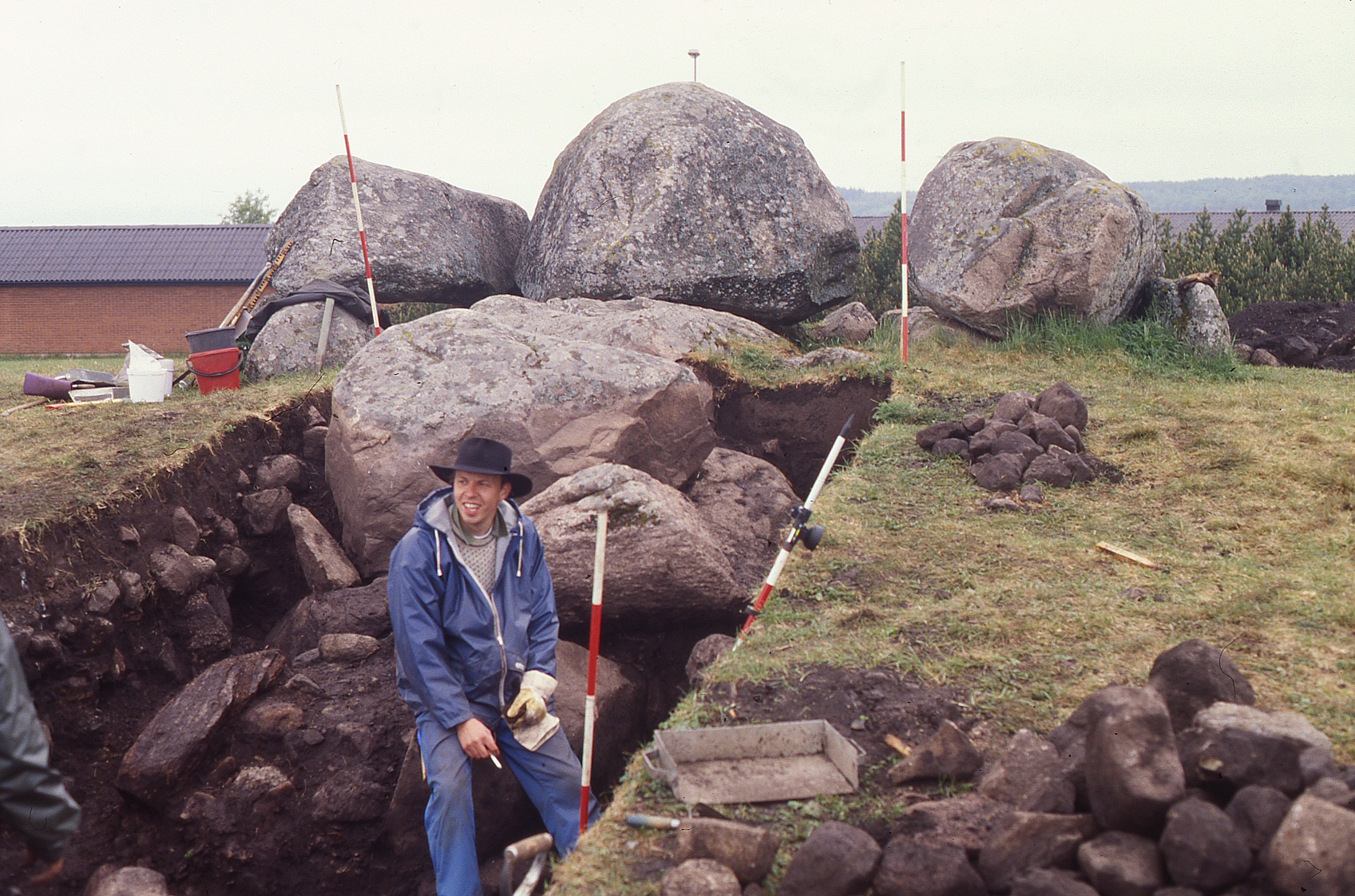 Utgrävning av gånggriften Hjälmars rör (Raä-nr Falköping 3:1) nära korsningen Midfalegatan-Wetterlinsgatan, Falköping, Falköpings kommun, f.d. Skaraborgs län, Västergötland, Västra Götalands län, Sverige. Bilden visar det östra schaktet kring gånggriftens gång. I förgrunden sitter arkeologen Anders Strinnholm på en gånghäll. Fotot är taget i maj 1994.